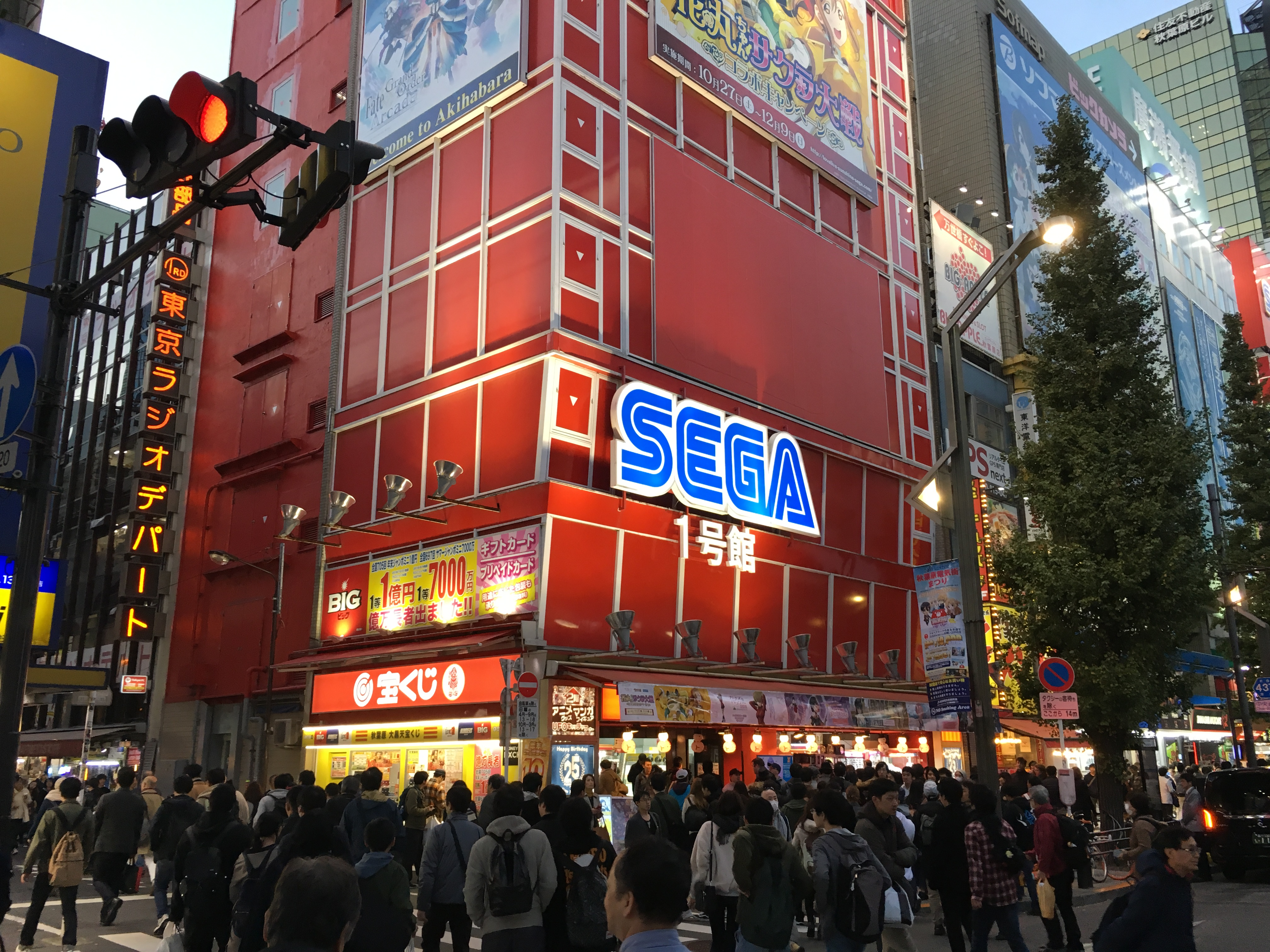 Foto della sala giochi Club Sega Akihabara 1 di Akihabara, Tokyo